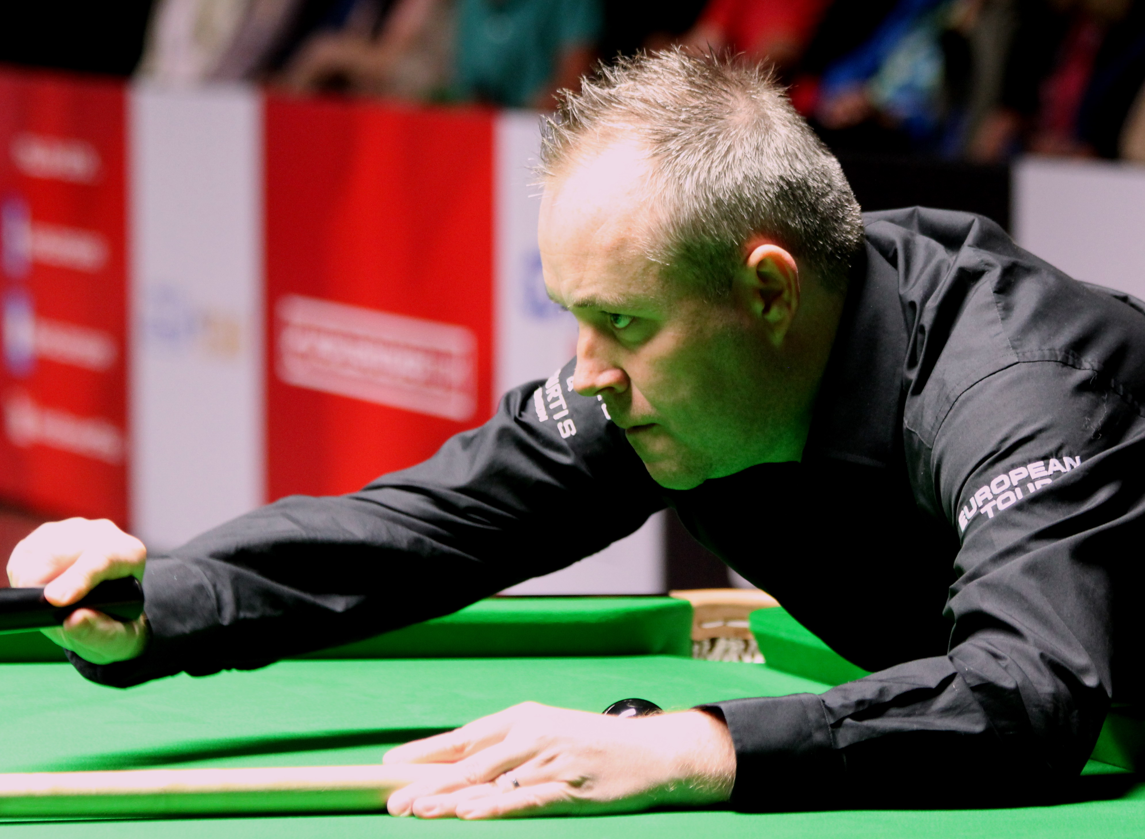 John Higgins beim Paul Hunter Classic 2014